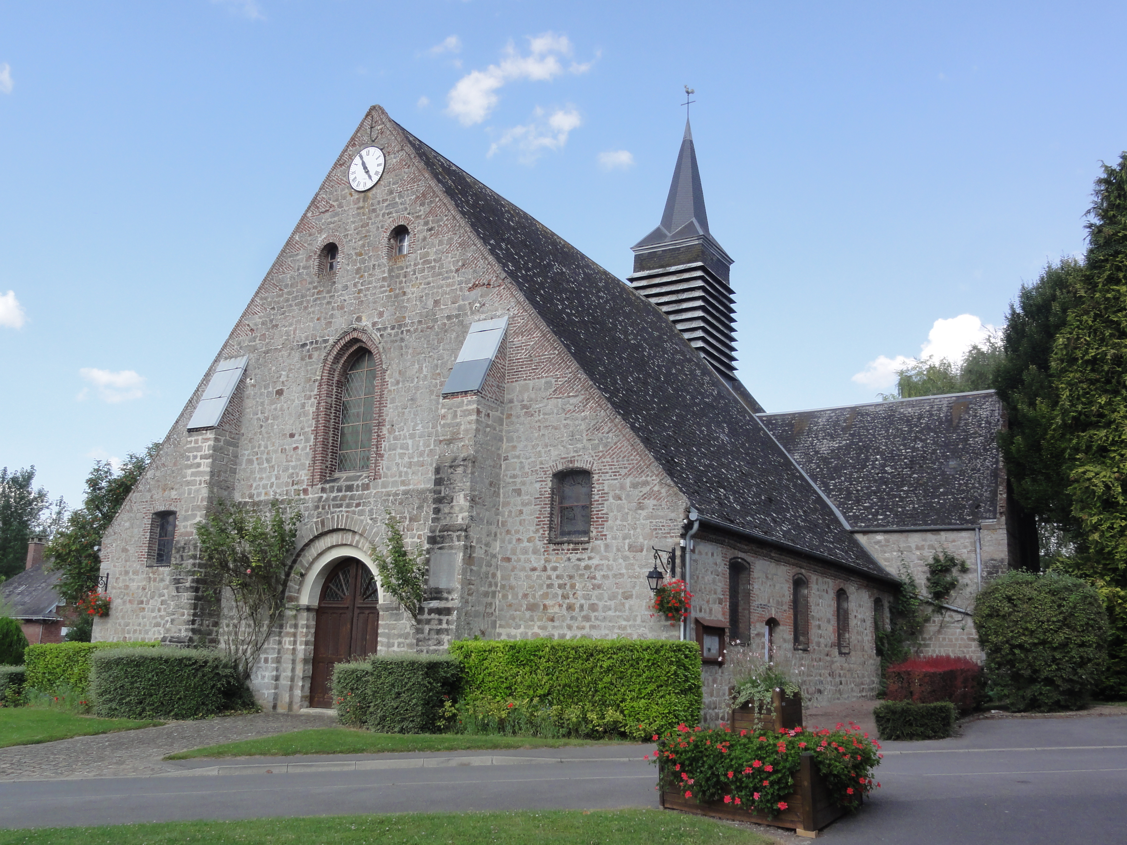 Seraucourt-le-Grand (Aisne) église Saint-Martin